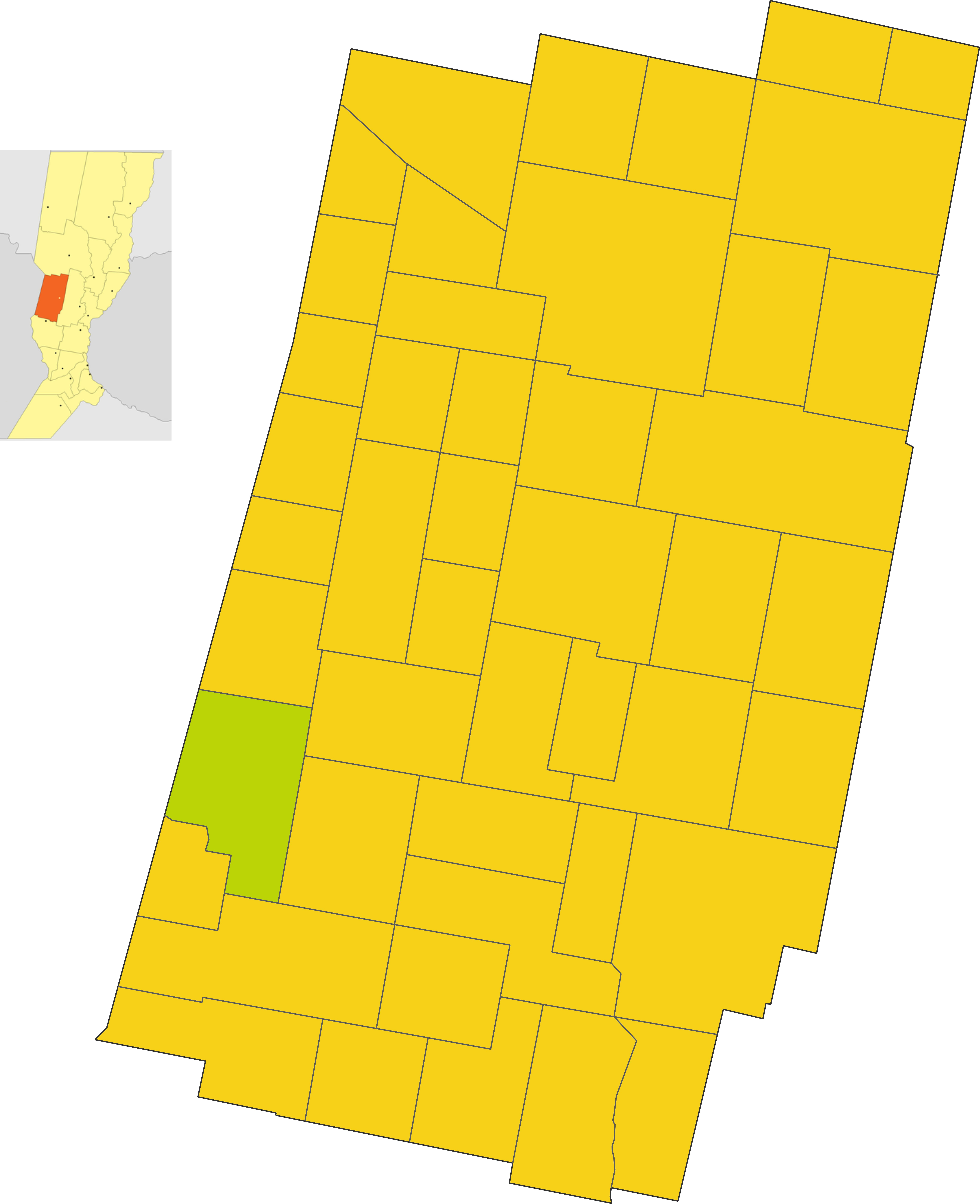 Map of the comuna de Josefina in Castellanos department, Santa Fe province, Argentina